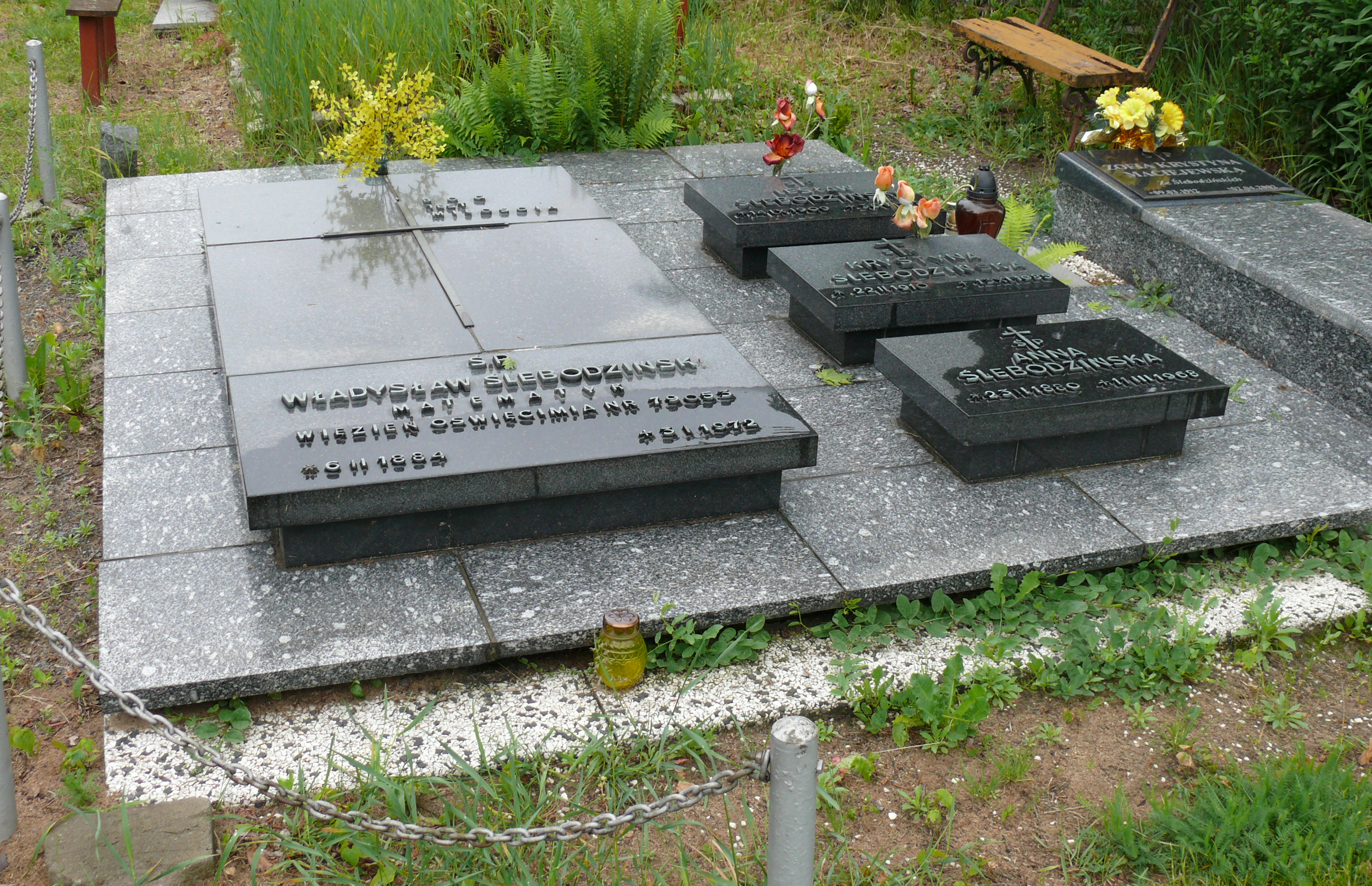 Grób Władysława Ślebodzińskiego; Cmentarz Św Rodziny, Wrocław